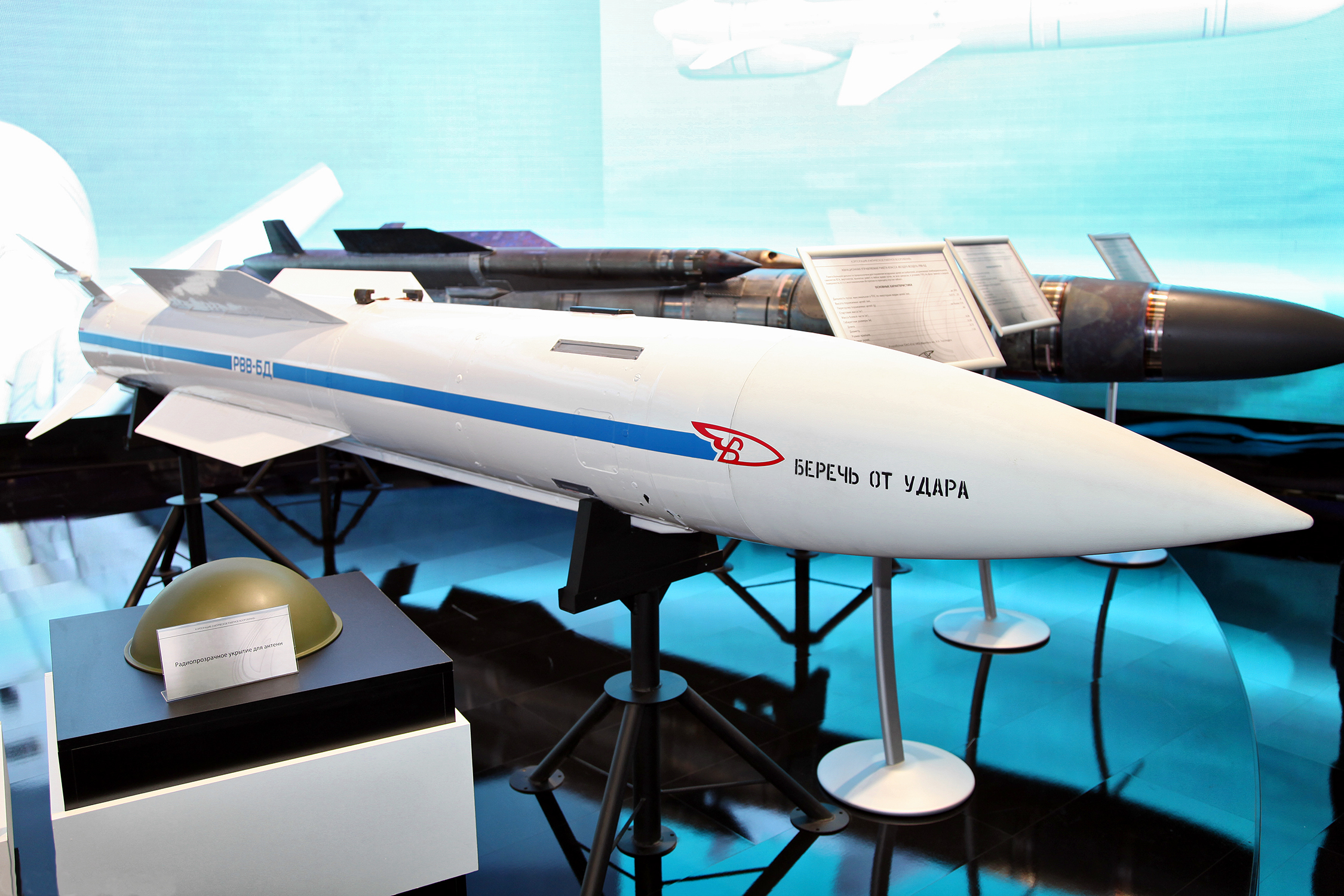 Авиационная ракета класса воздух-воздух большой дальности РВВ-БД (RVV-BD AA missile)